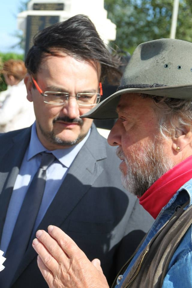 Lors de la pose de Stolpersteins en France, août 2018, Gunter Demnig et Christophe Woehrle